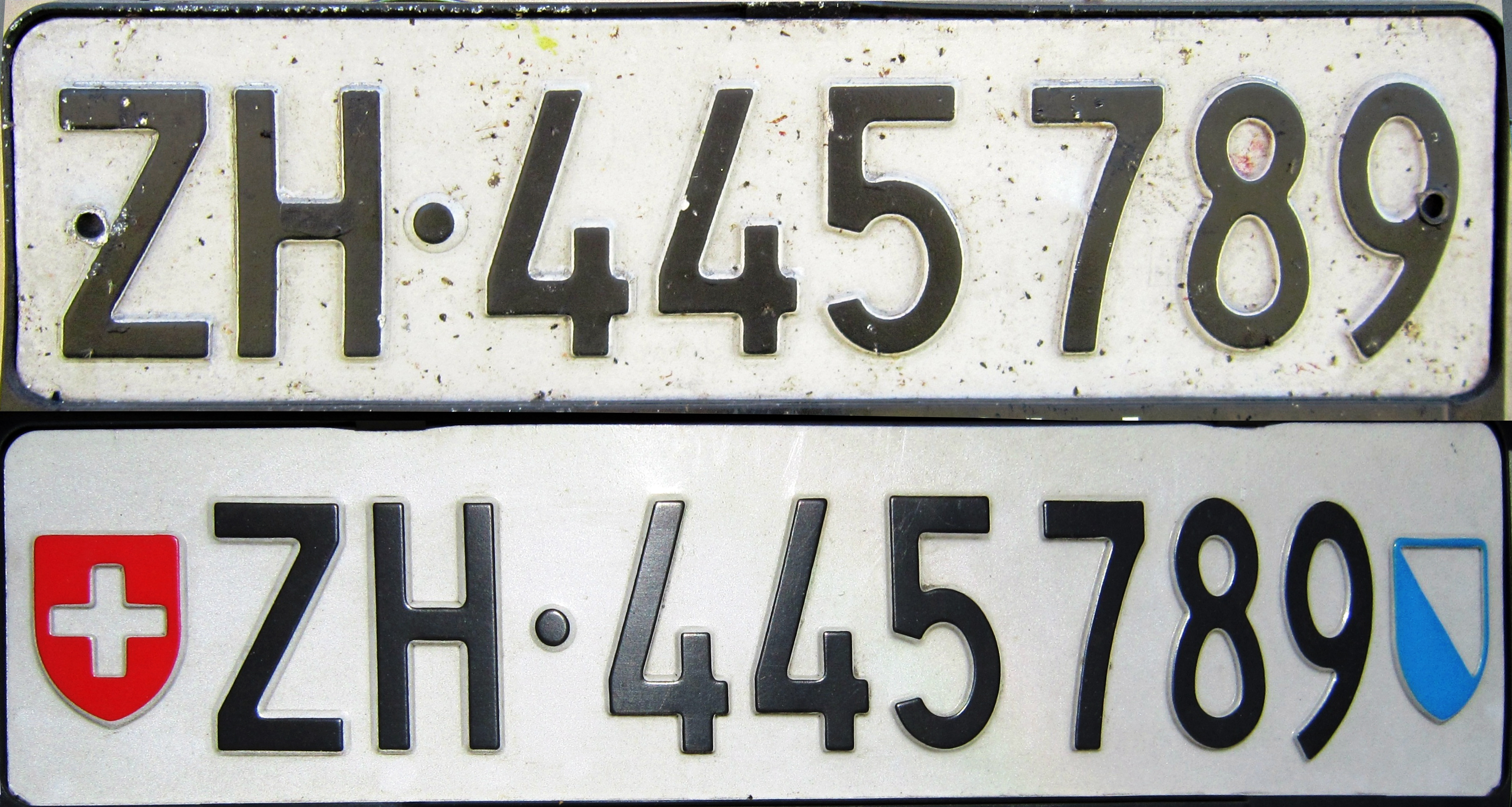 Zwitserland voor en achter Zurich